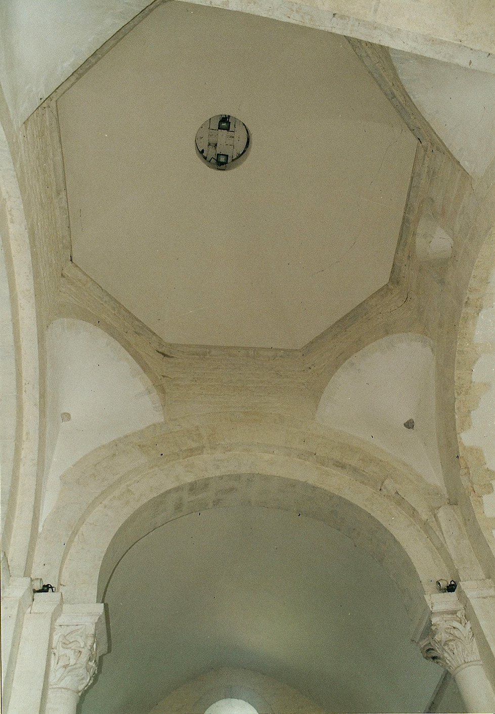 St.-André-de-Bâgé, Trompenkuppel über Vierung